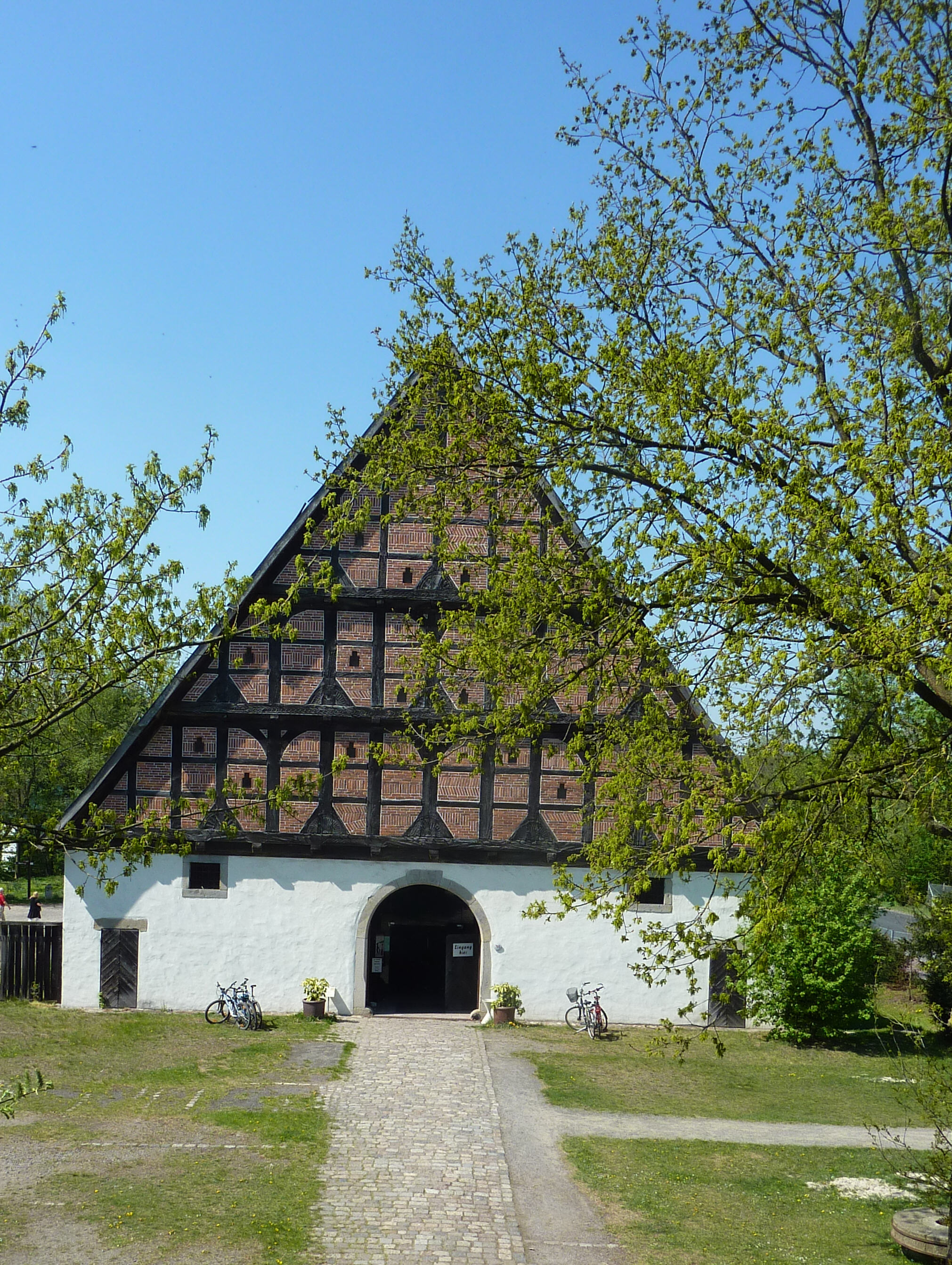 Museumsdorf Cloppenburg, Münchhausenscheune: Kasse, Shop, Sonderausstellungen